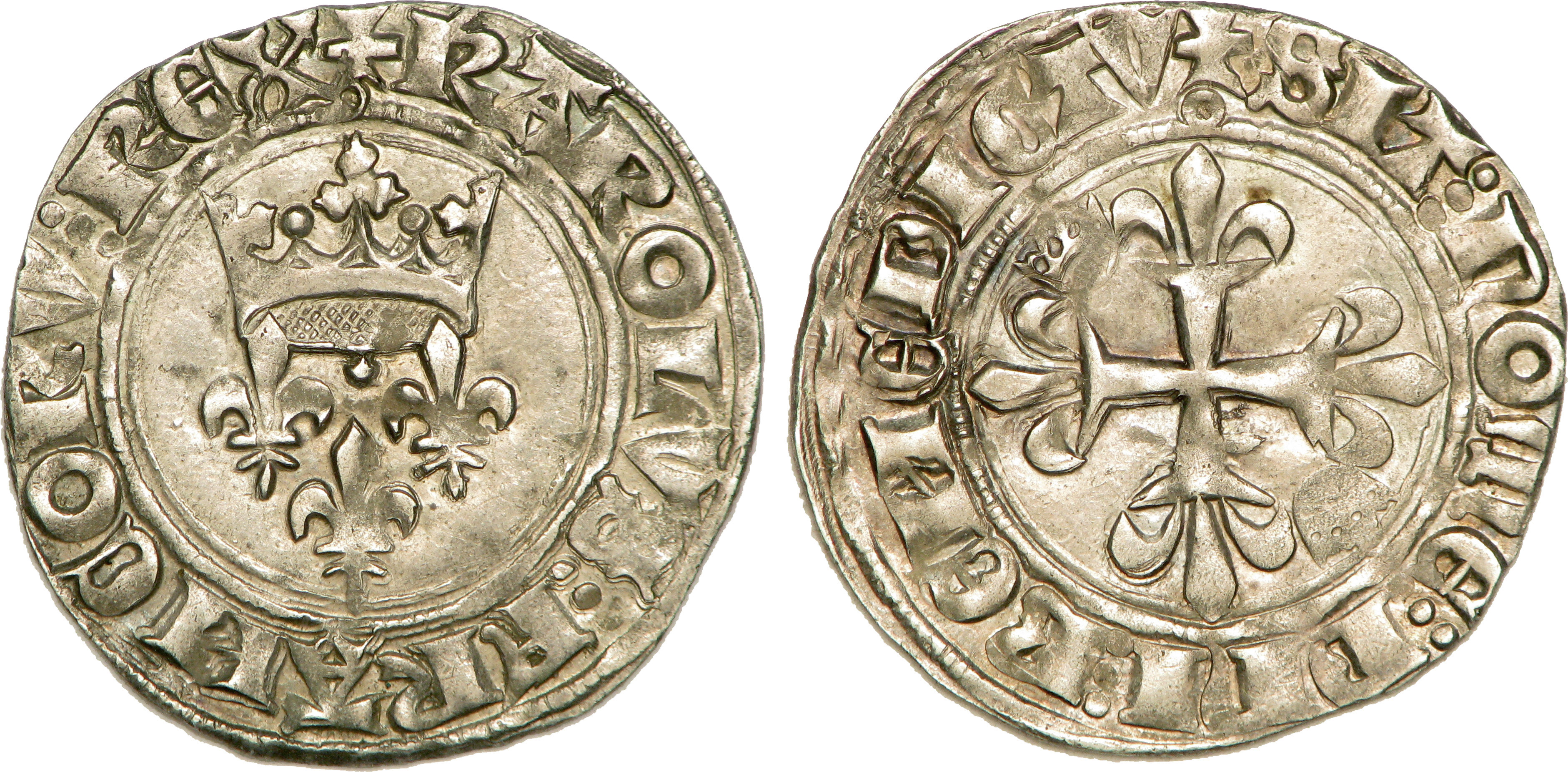 Nom de l'atelier/ville : Paris Métal : billon Diamètre : 27mm Axe des coins : 3h. Poids : 3,13g. Titulature avers : + KAROLVS: FRANCORV: REX, (ponctuation par trois points superposés, N de FRANCORV romaines et rétrograde). Description avers : Trois lis posés 2 et 1 sous une couronne tréflée. Traduction avers : (Charles, roi des Francs). Titulature revers : + SIT: nOmE: DnI: BENEDICTV, (ponctuation par trois points superposés, N de BENEDICTV romaine et rétrograde). Description revers : Croix fleurdelisée cantonnée aux 1 et 4 d'une couronne. Traduction revers : (Béni soit le nom du Seigneur)